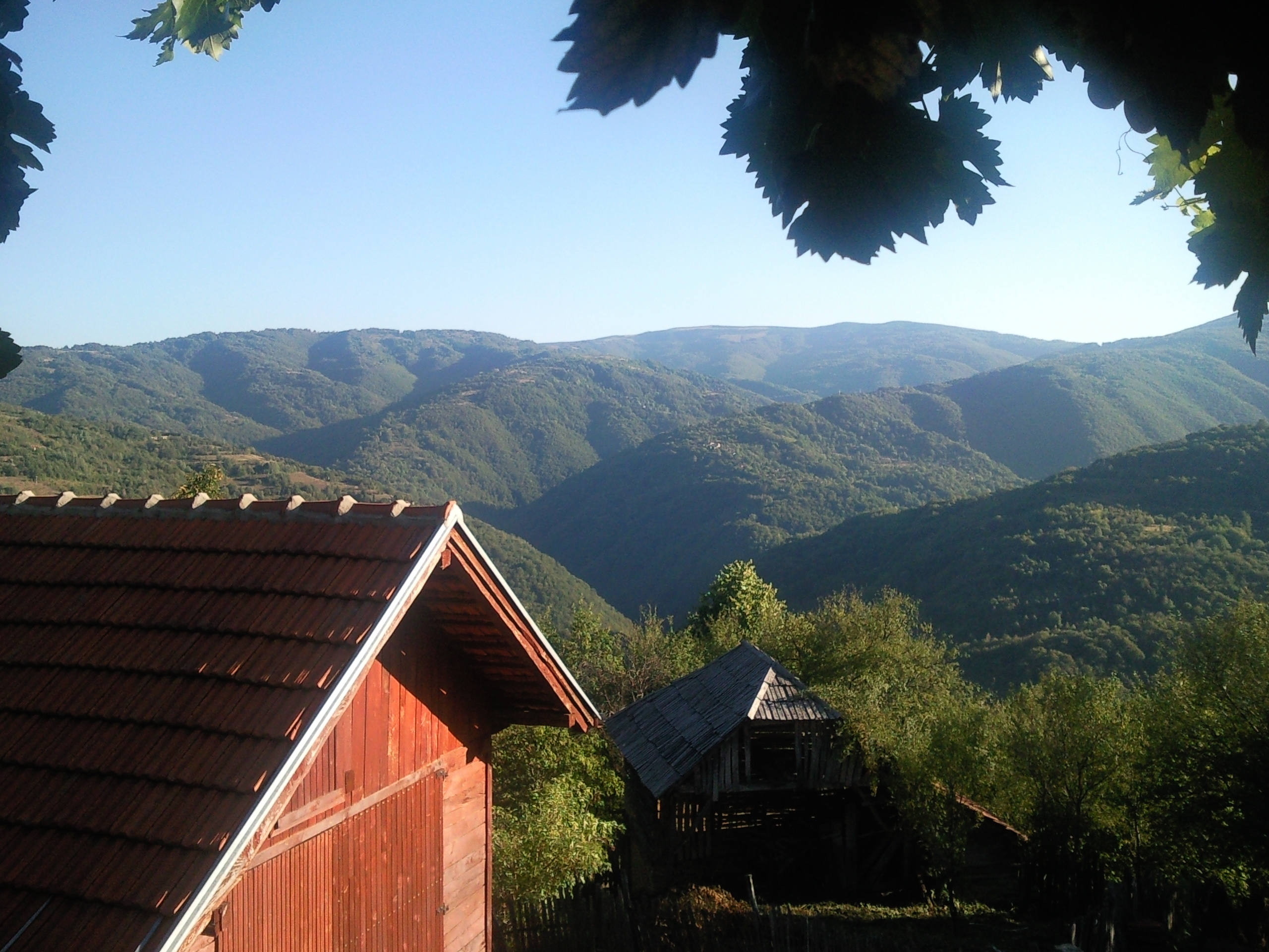 Pogled iz Krivog Dela na dolinu reke Vlasine i Sastav Reka